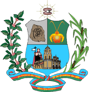 Escudo del municipio Crespo, estado Lara, Venezuela